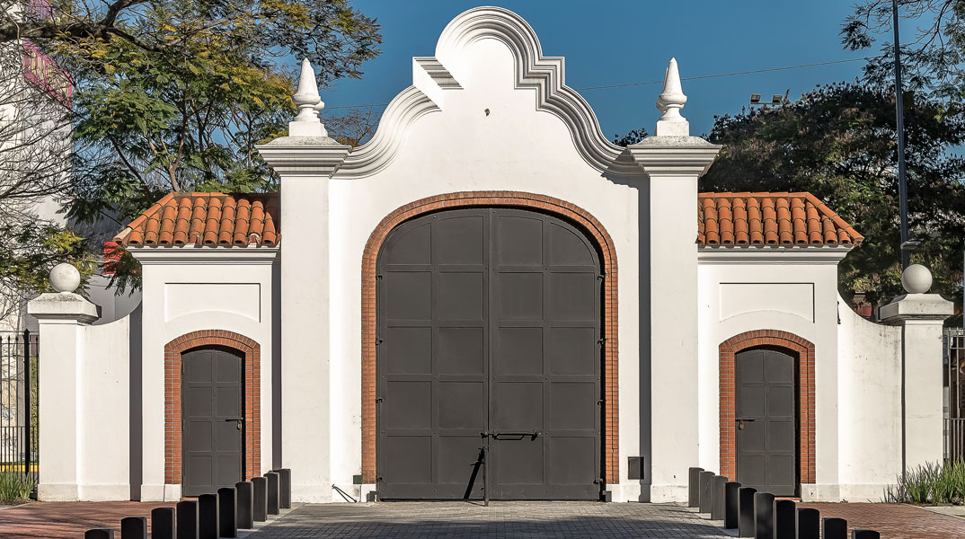 Portón de acceso a la Quinta de Olivos